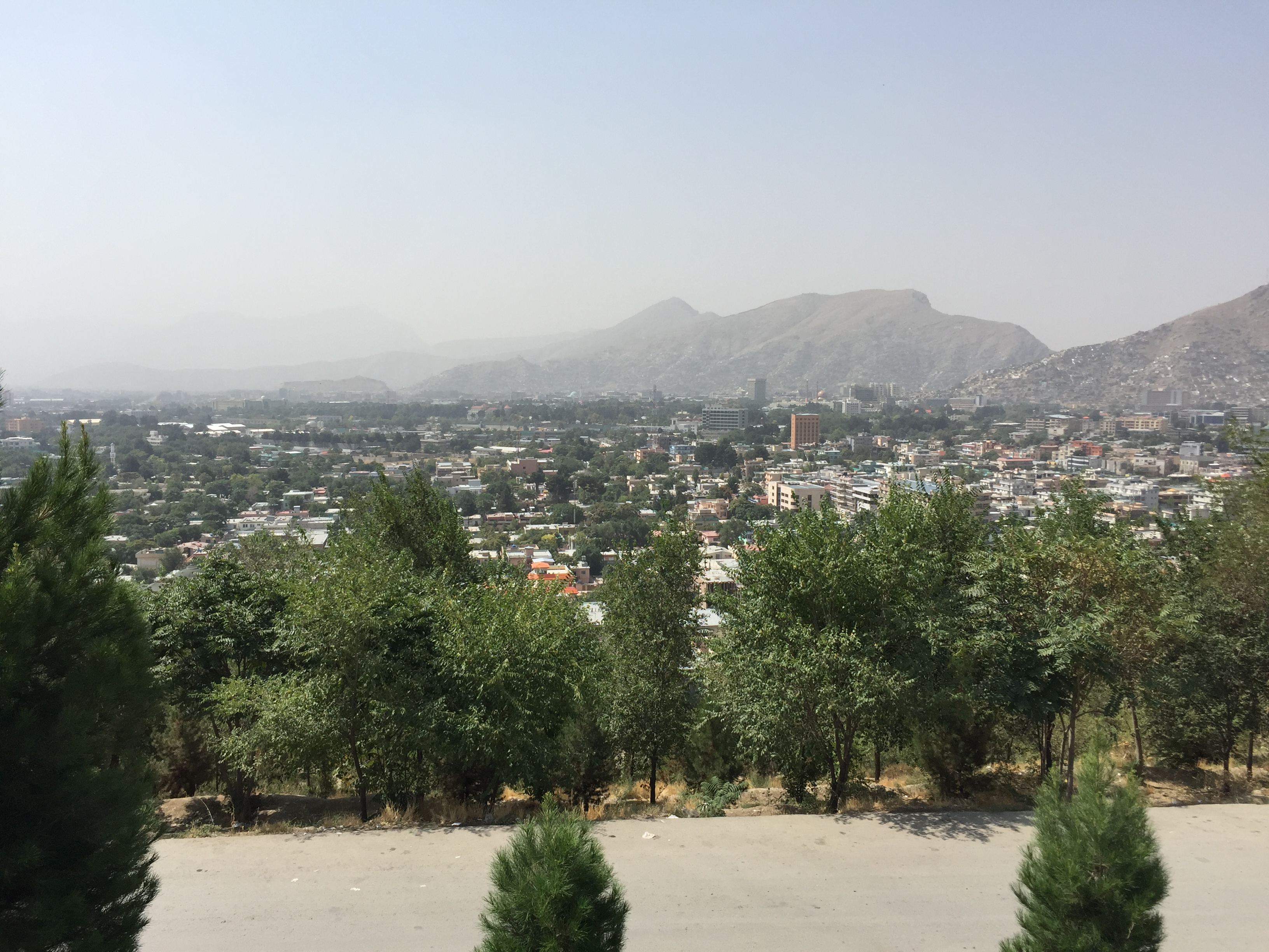 Kabul 2016